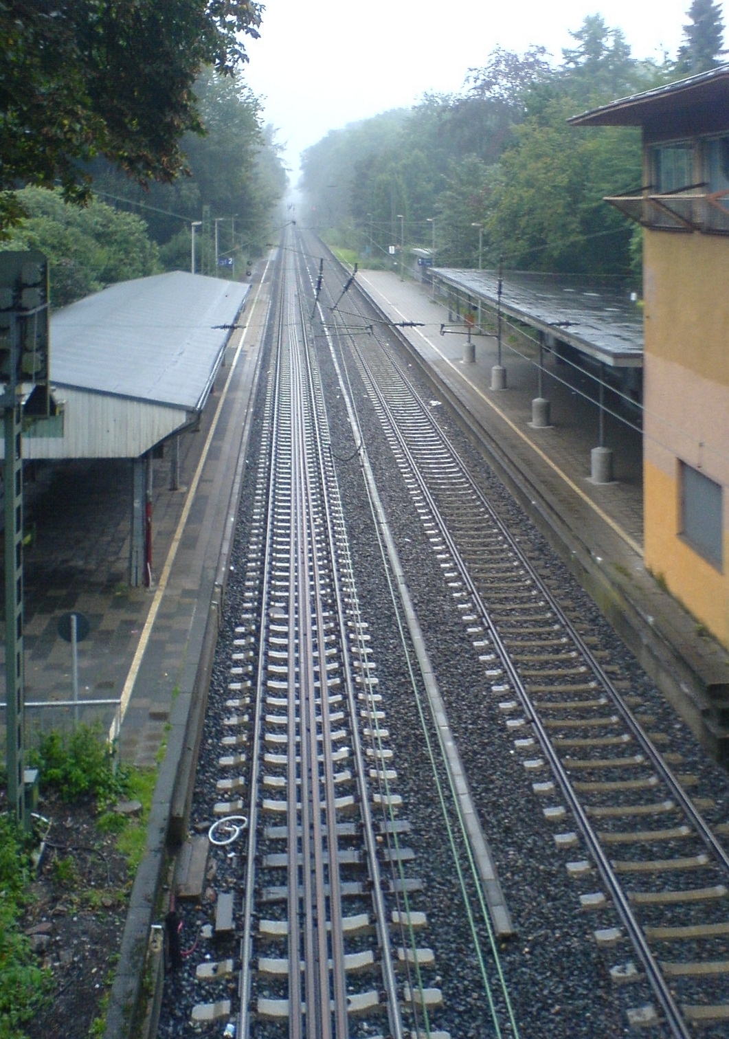 Bahnhof Essen-Stadtwald Bahnsteig